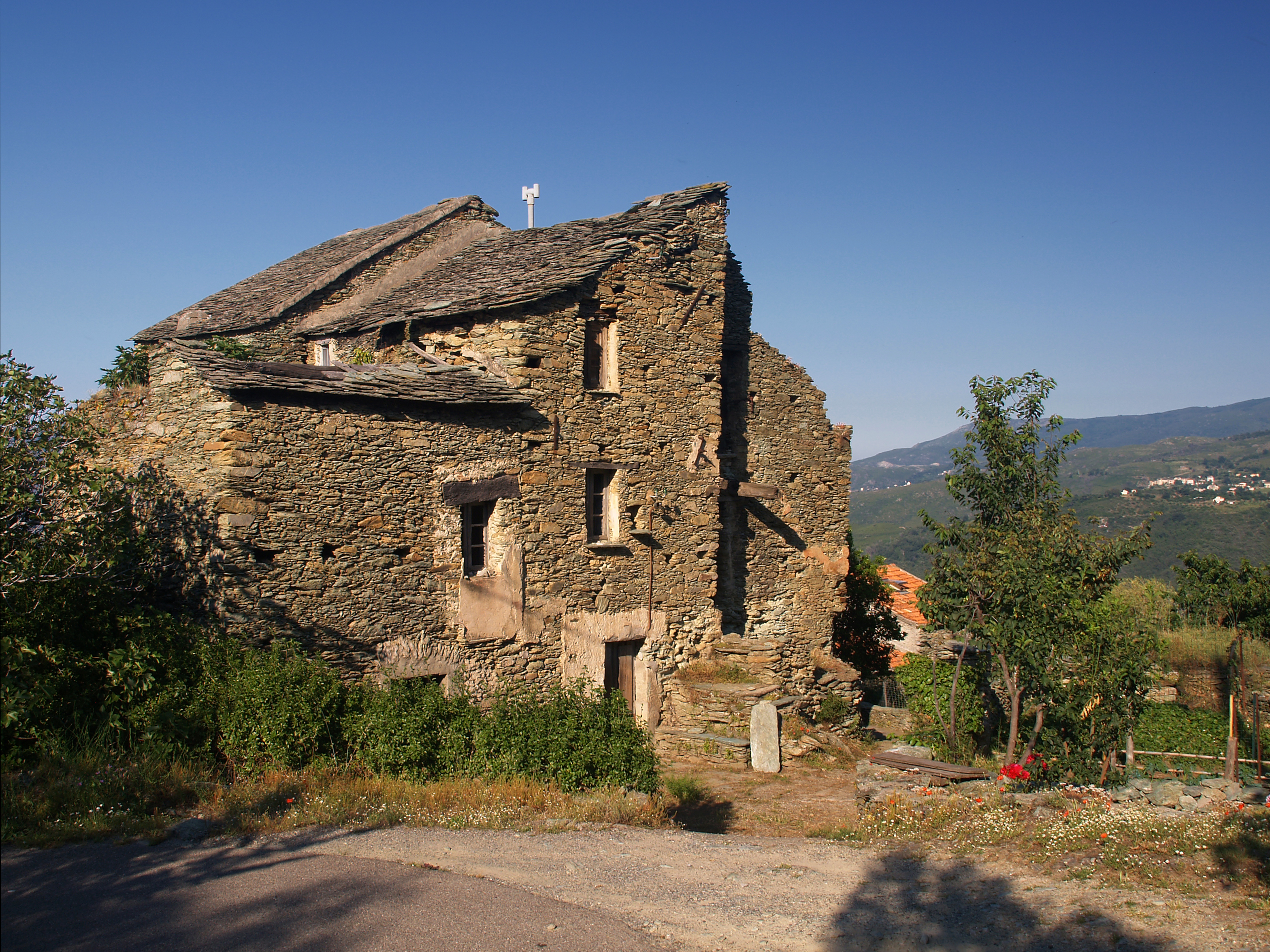 San-Gavino-di-Tenda (Corsica) - Maison ruinée